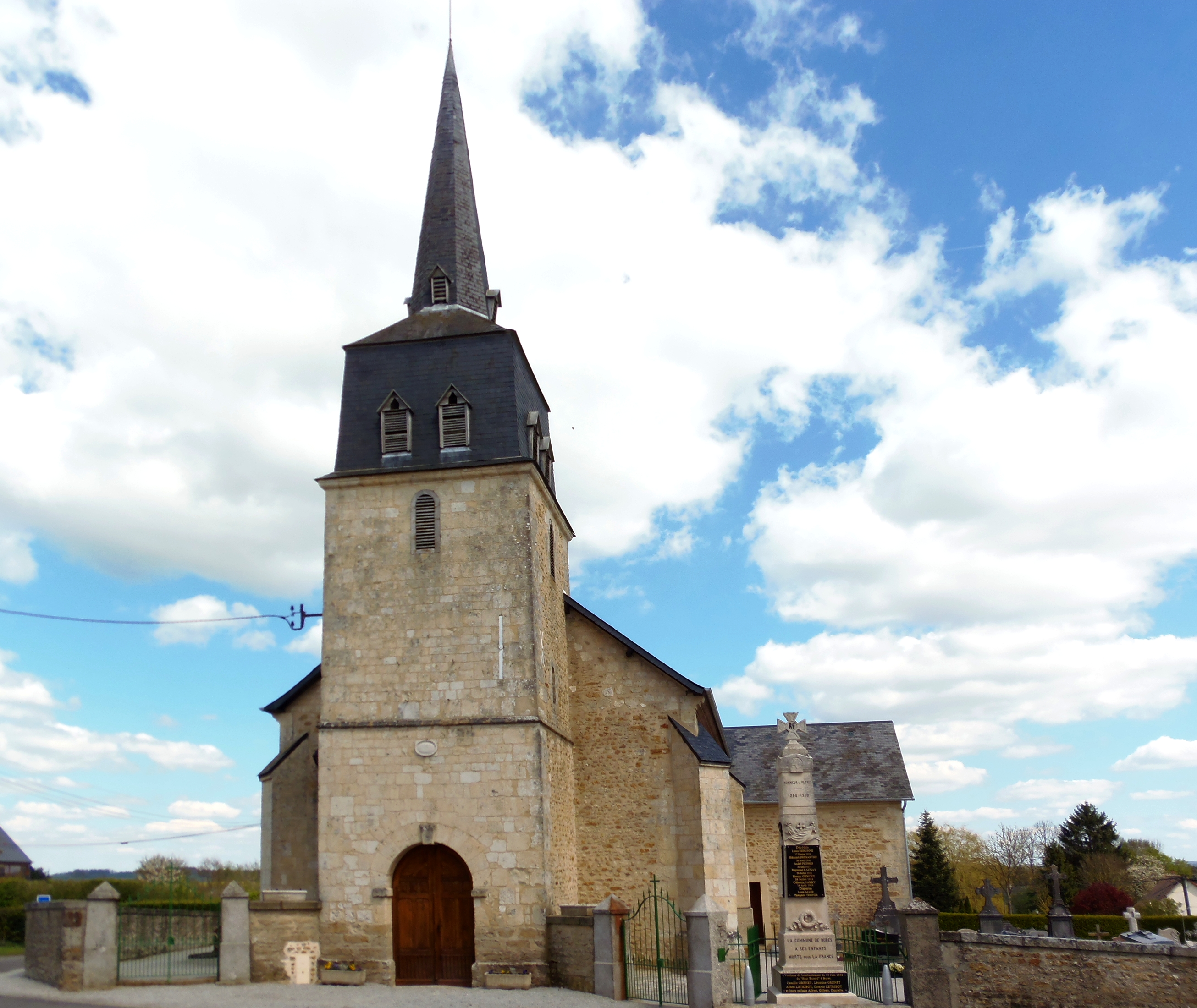 Bures (Normandie, France). L'église Saint-Aubin.